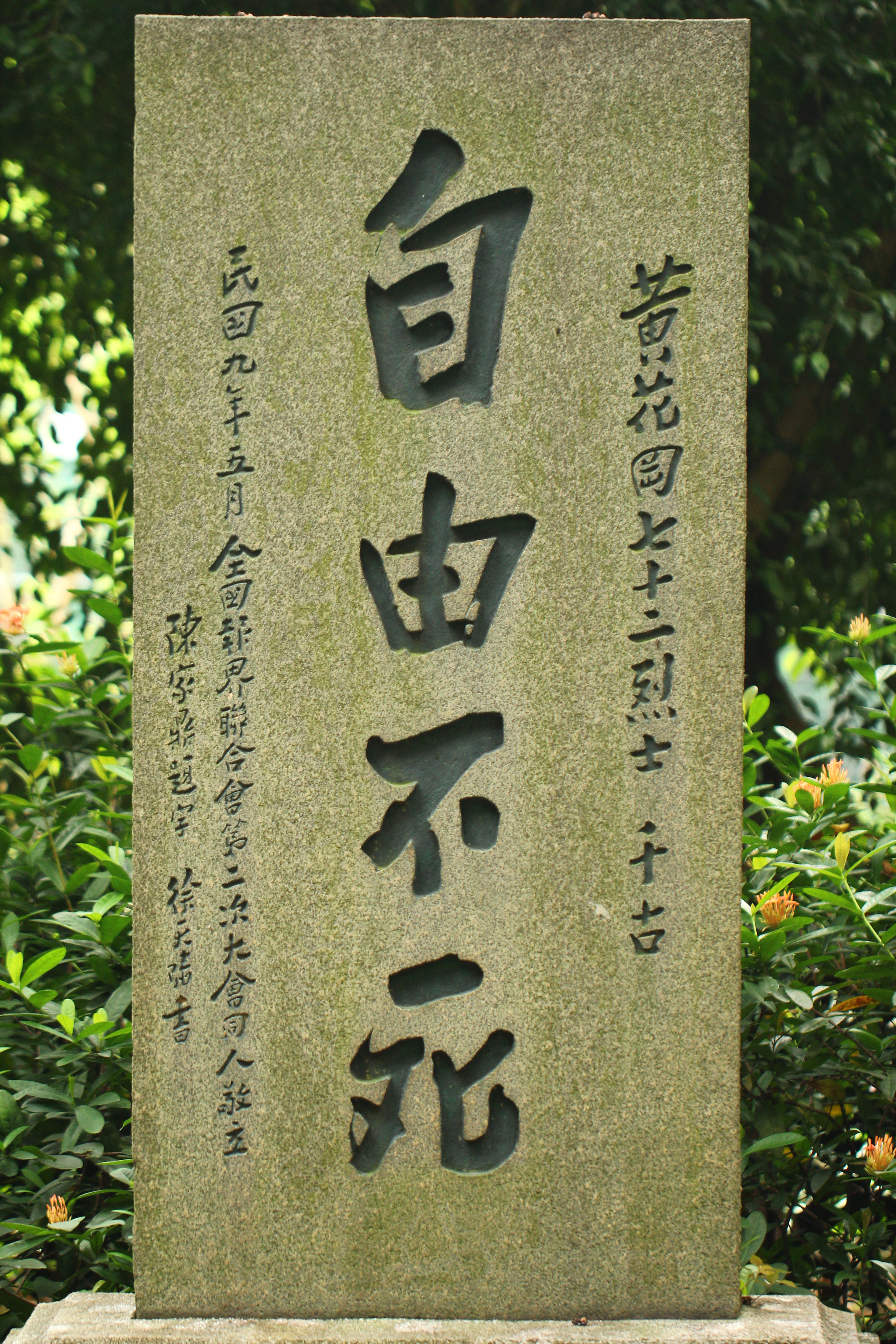 中華民國九年五月，全國報界聯合會第二次大會同人敬立。